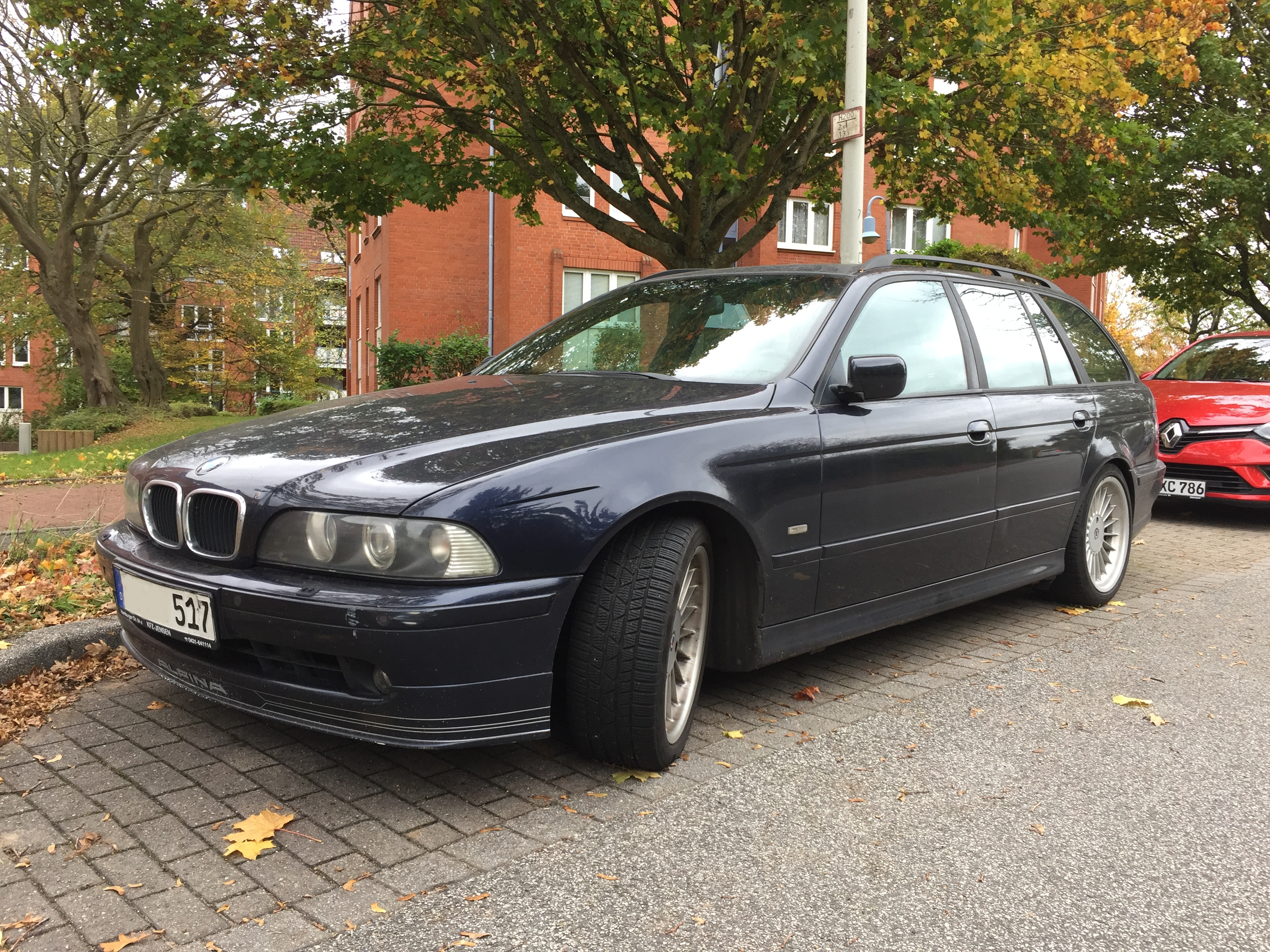 BMW Alpina B10 touring